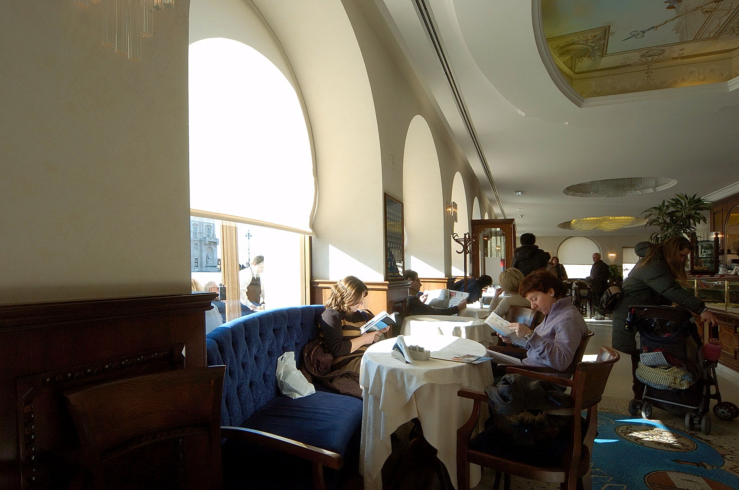 Cafe degli Specchi in Trieste, Italy